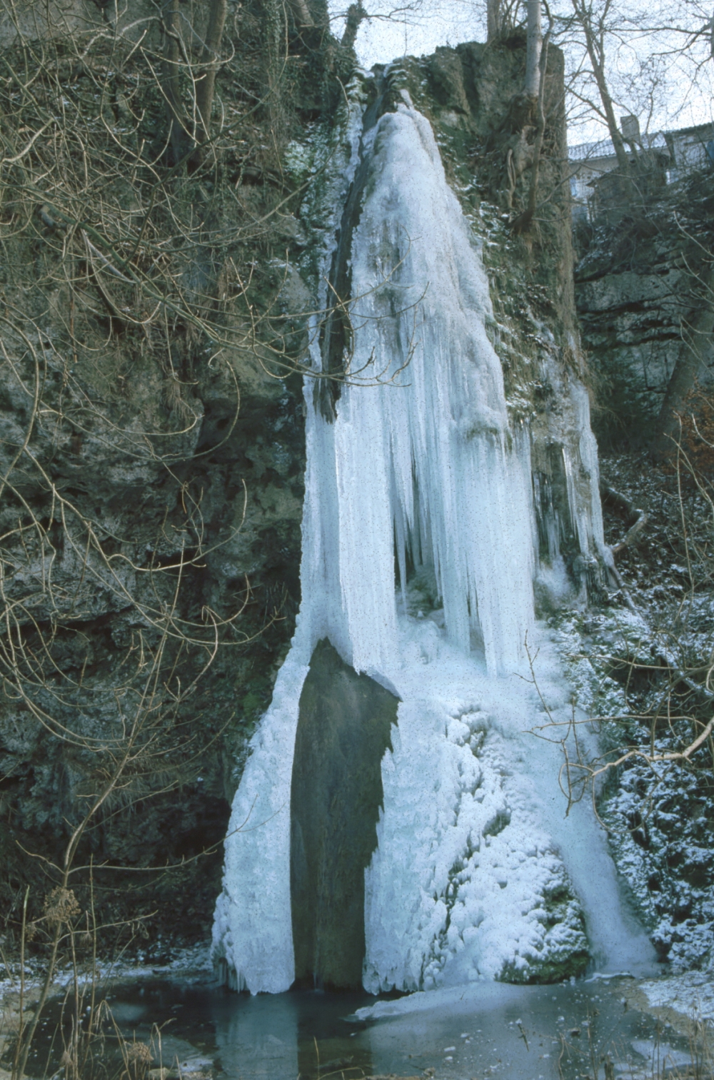 In kalten Wintern formt der Gos-Wasserfall an der Unterdrackensteiner Kalksinterterrasse bizarre Eisgebilde